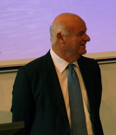 Joe Borg og Paal Frisvold samtaler før det åpne debattmøtet på universitetet i Reykjavik 25.9.2010.